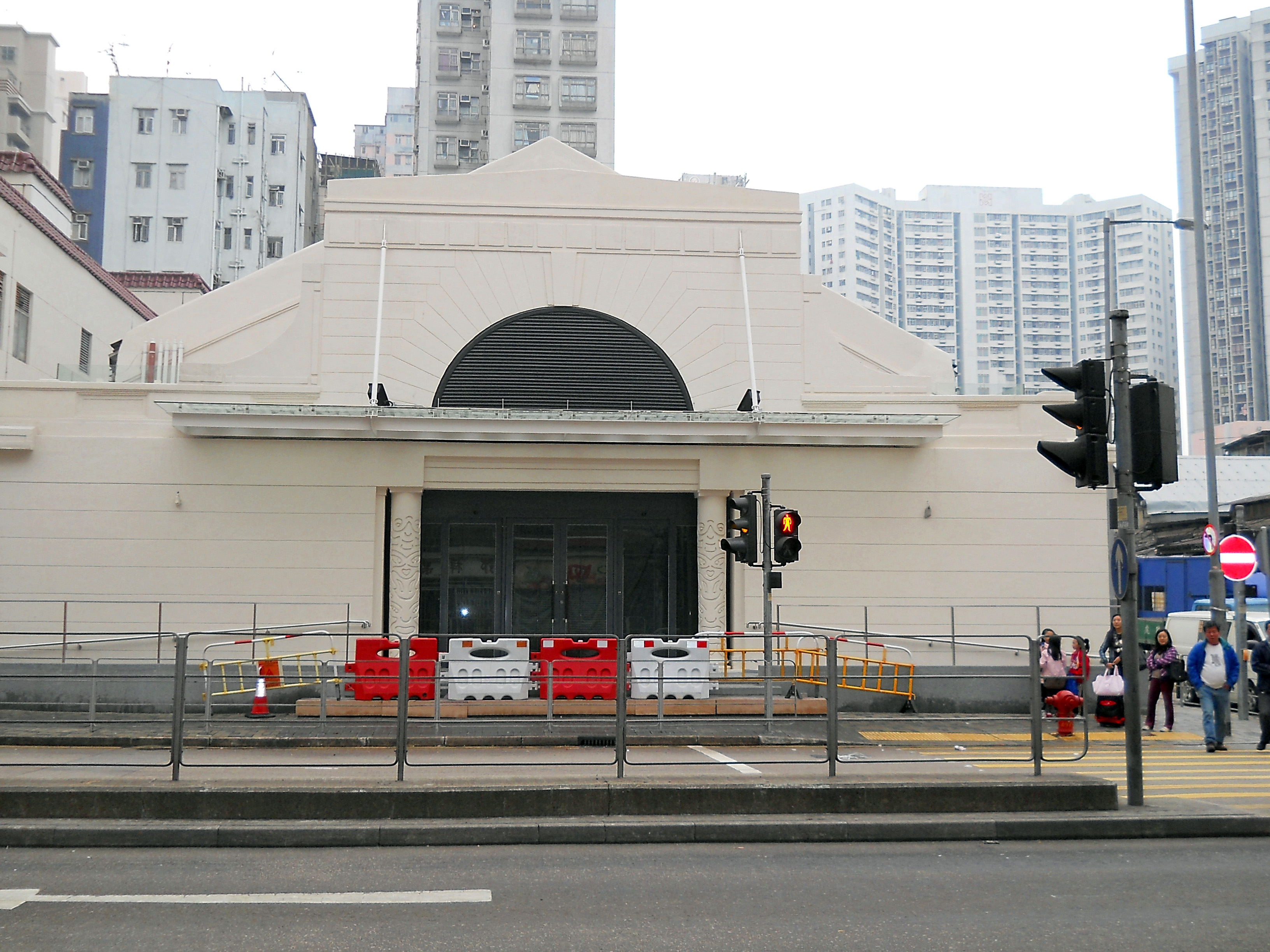 中文（香港）: 油麻地戲院正門